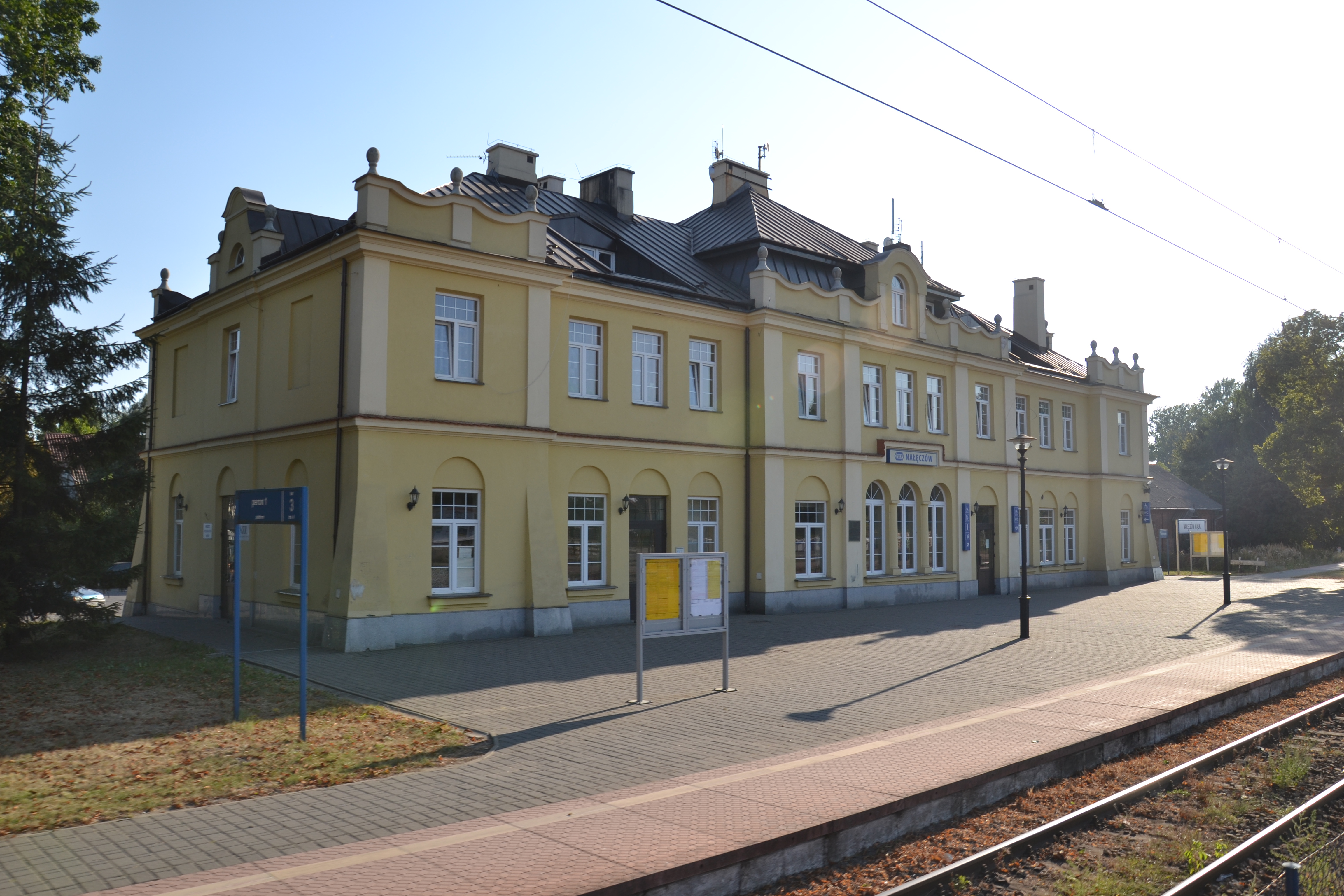 Widok dworca w Nałęczowie od strony peronów This photo was taken during Railway Wikiexpedition 2015 set up by Wikimedia Polska Association in cooperation with Fundacja Grupy PKP. You can see all photographs in category Wikiekspedycja kolejowa 2015.